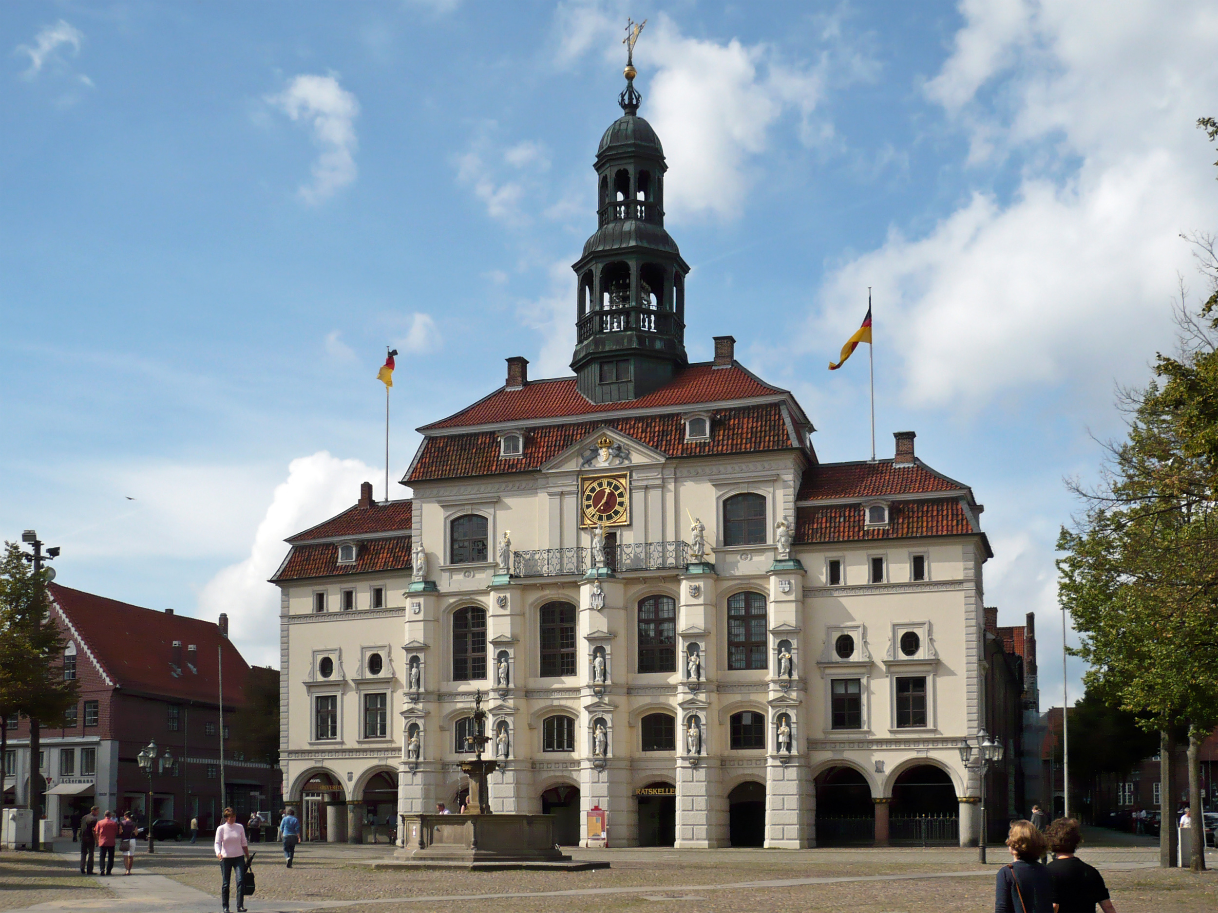 Der Blick richtet sich auf die prächtige Fassade, davor der Marktplatz mit dem Lunabrunnen.